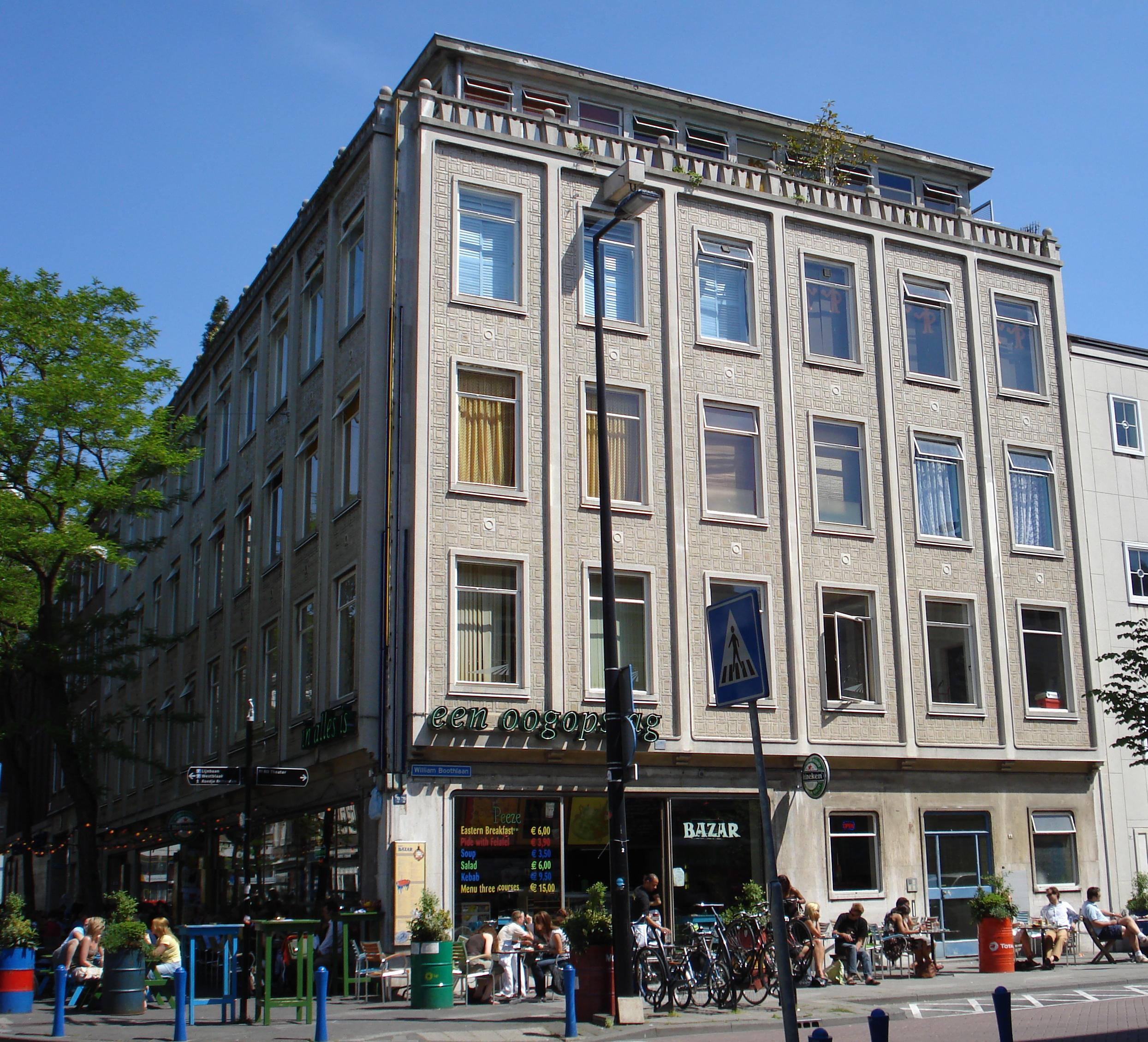 Rotterdam, Witte de Withstraat 16. Gemeentemonument. Architect: Cornelis Elffers